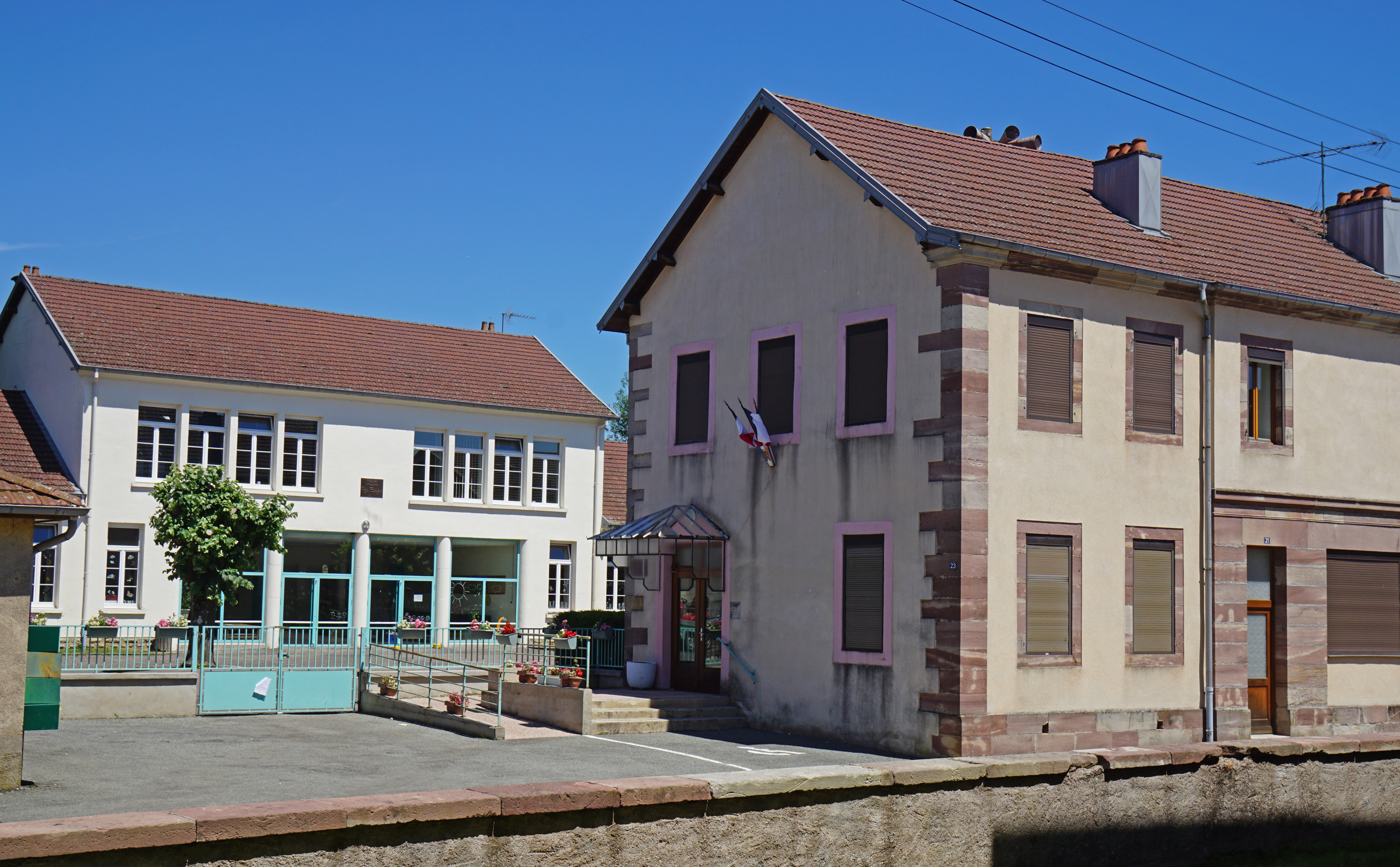 La mairie et l'école de La Chapelle-lès-Luxeuil.